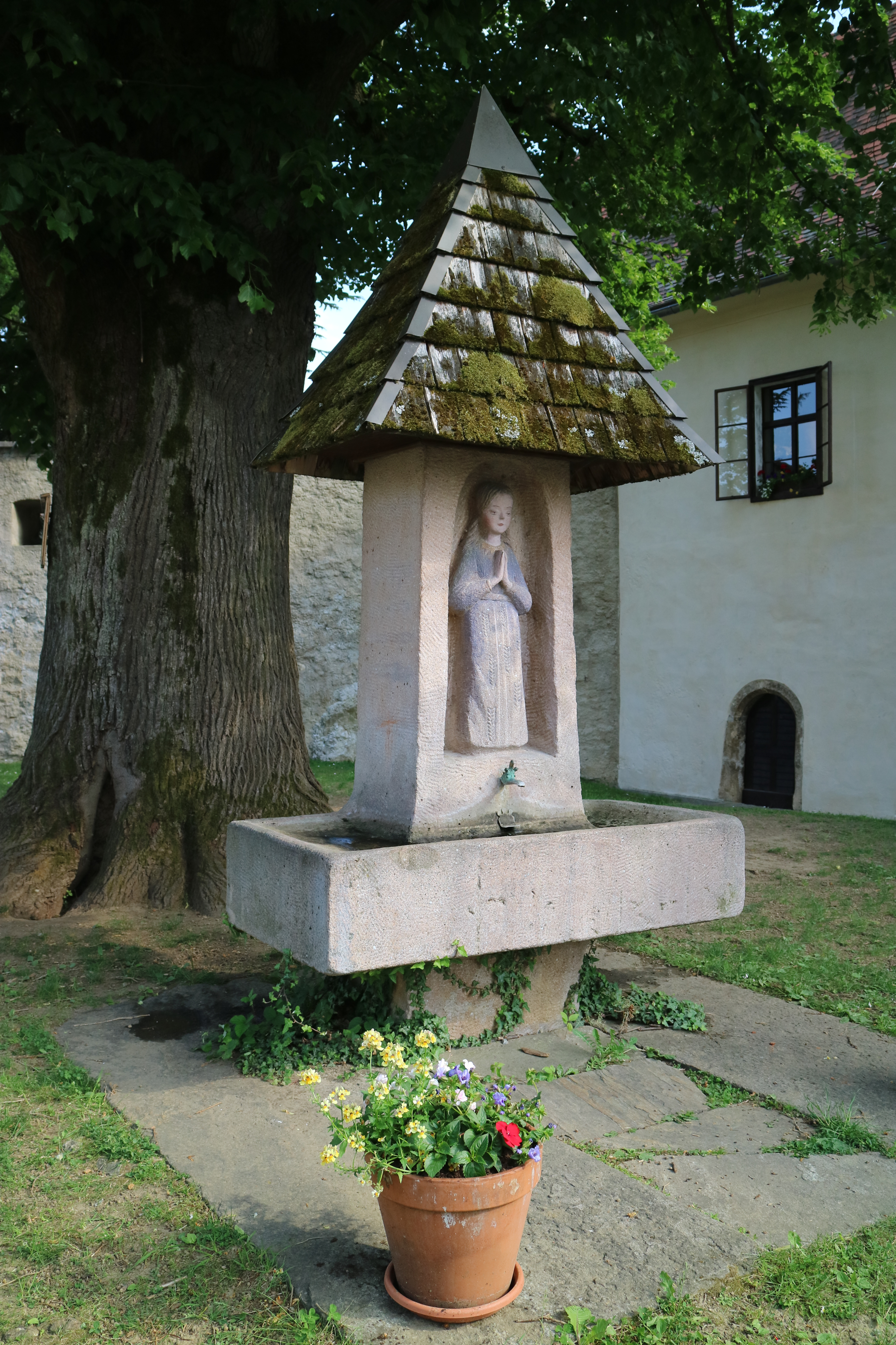 Brunnen von Alfred Schlosser bei der Wallfahrtskirche Maria Straßengel